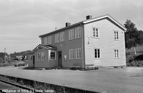 Vikhamar stasjon 1976